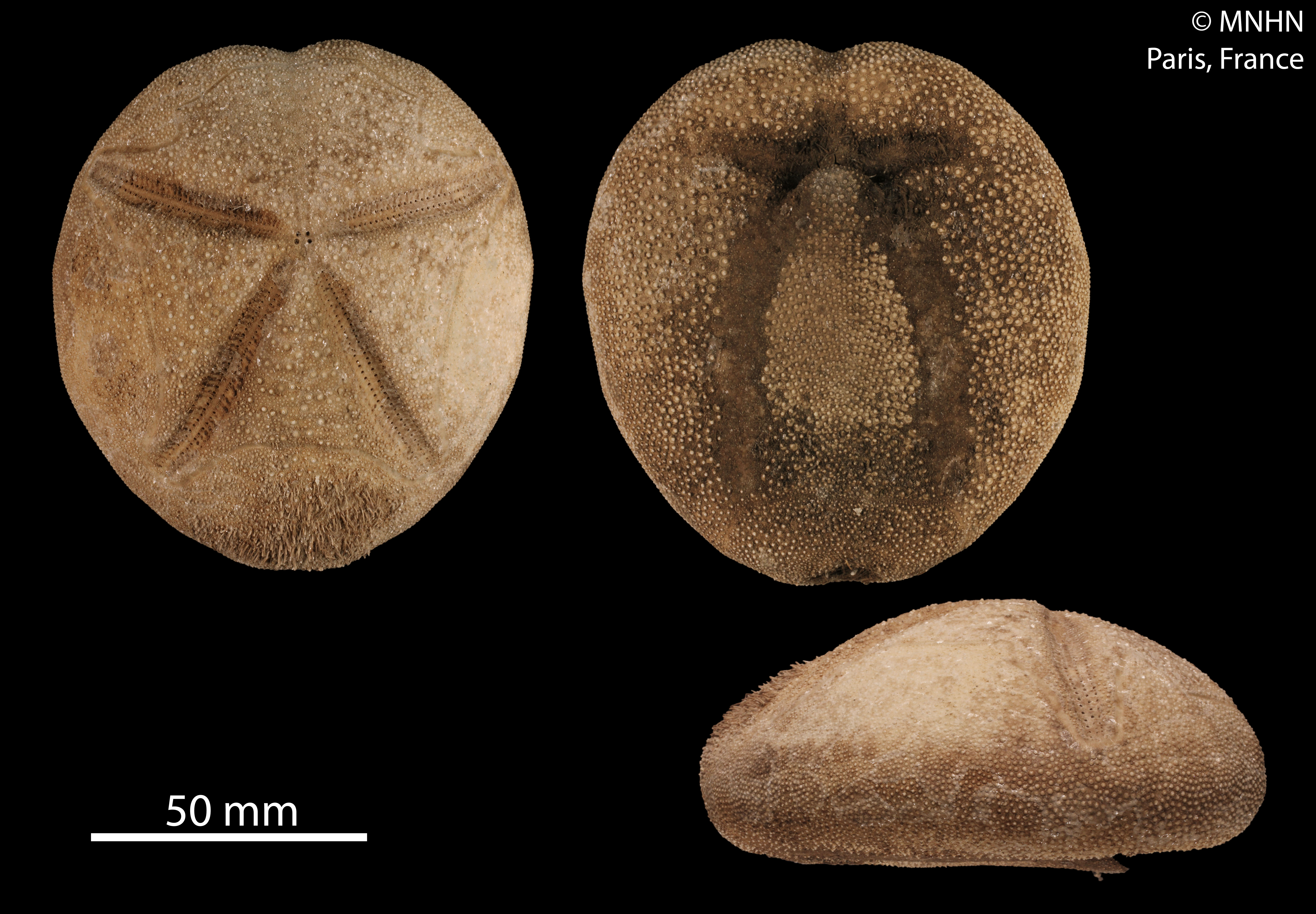 Meoma ventricosa grandisSpécimen MNHN-IE-2013-10574, syntype de Kleinia nigra A. Agassiz, 1863Collection : Échinodermes (IE)Muséum National d'Histoire Naturelle (Paris, France) Origine : Libellé du pays : MEXIQUE Localité/Lieu-dit : Acapulco